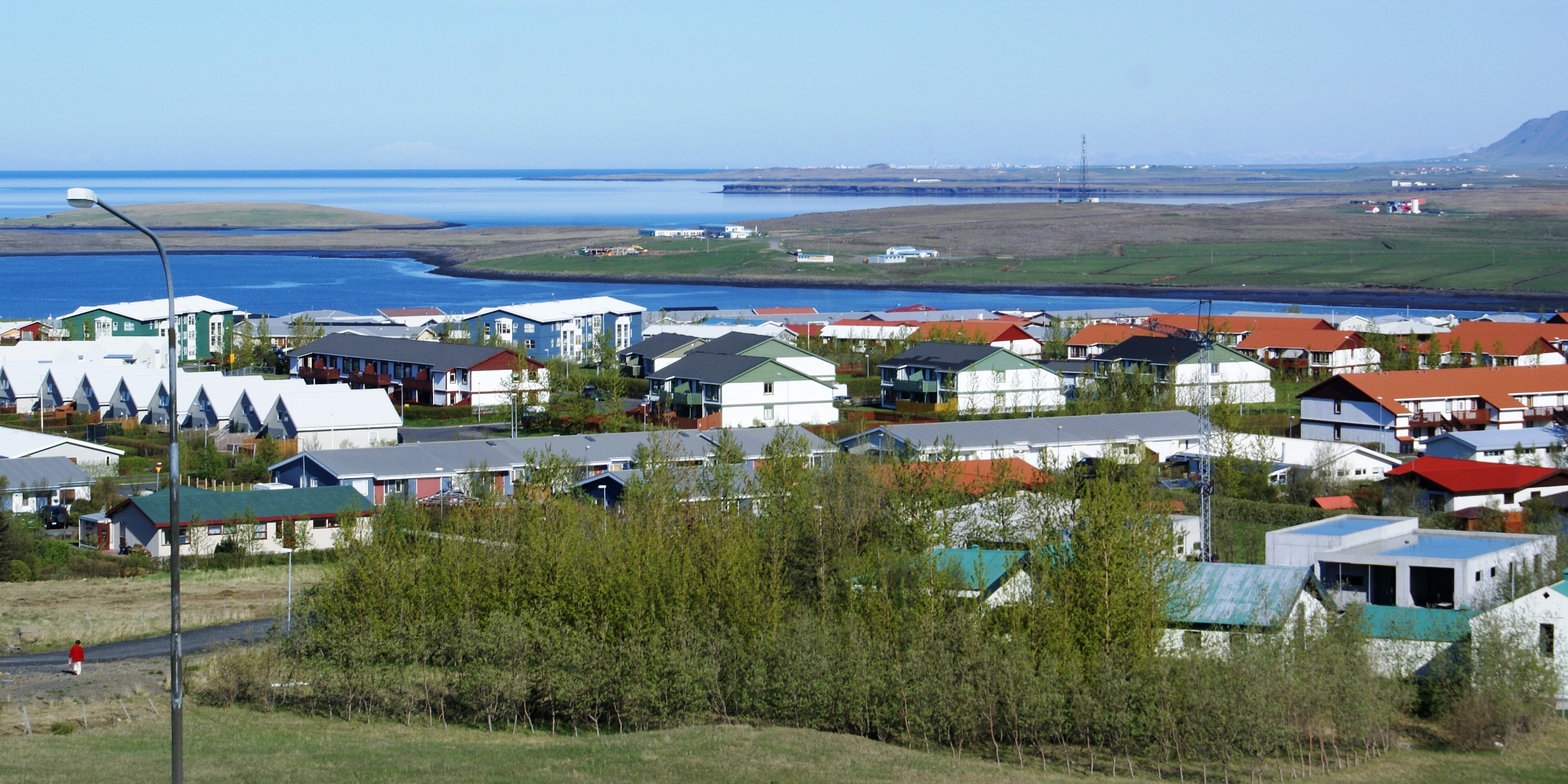 Mosfellsbær (einnig kallað Mosó) er sveitarfélag sem liggur norðaustan við Reykjavík.